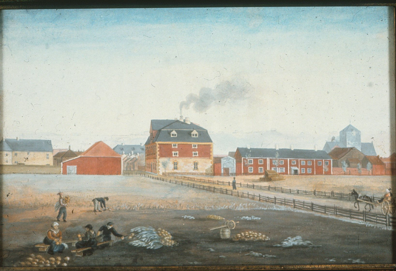 Fra Byantikvarens lysbildesamling. Sukkerraffineriet fra 1754 på Leütenhaven er Norges eldste bevarte fabrikkbygning og stedet hvor E. C. Dahls bryggeri startet opp i 1856. The sugar refinery from 1754 located at Leütenhaven in Trondheim is Norway's oldest preserved factory building, as well as the place where E. C. Dahls breweries started their production in 1856. Huset ble bygget i 1754 av Trondhjems Sukkerraffinaderi. Stiftamtmannen i Trondhjem, von Rantzow, sendte etter pålegg følgende beskrivelse av anlegget til Kommersekollegiet i København: "Angaaende Sukkerraffinaderi-huset og de til Sukkerraffinaderiet hørende redskaper. Dette hus befandtes 112 Fod langt, 56 Fod bredt og 60 Fod høit. Den underste Etage af Grundmur, 8 1/2 Alen høi samt 2 Alen tyk, og de øverste Etager af Tømmer, med et stort italiensk Tag paa af Bor dog tækket med blaa glasserede Sten, alle fast spigrede og tildels i Kalk nedlagt. Paa Taget er i de udbyggede Gavler 12 Vinduer, i Træbygningen 43 og i Murbygningen 14 Vinduer. I Huset paa den høire Side af Indgangen fra Gaden og Nord, er 4 Etager og paa den venstre Side 5 Etager. I underste Etage paa den høire Side er 3 Værelser mod Syd, opmurede i en Linie, de 2 for Sukker og Sukkerkandis at tørre med 2 tilstøbte Jernkakkelovne i, og det 3die til at fylde det kogte Sukker i Formene."